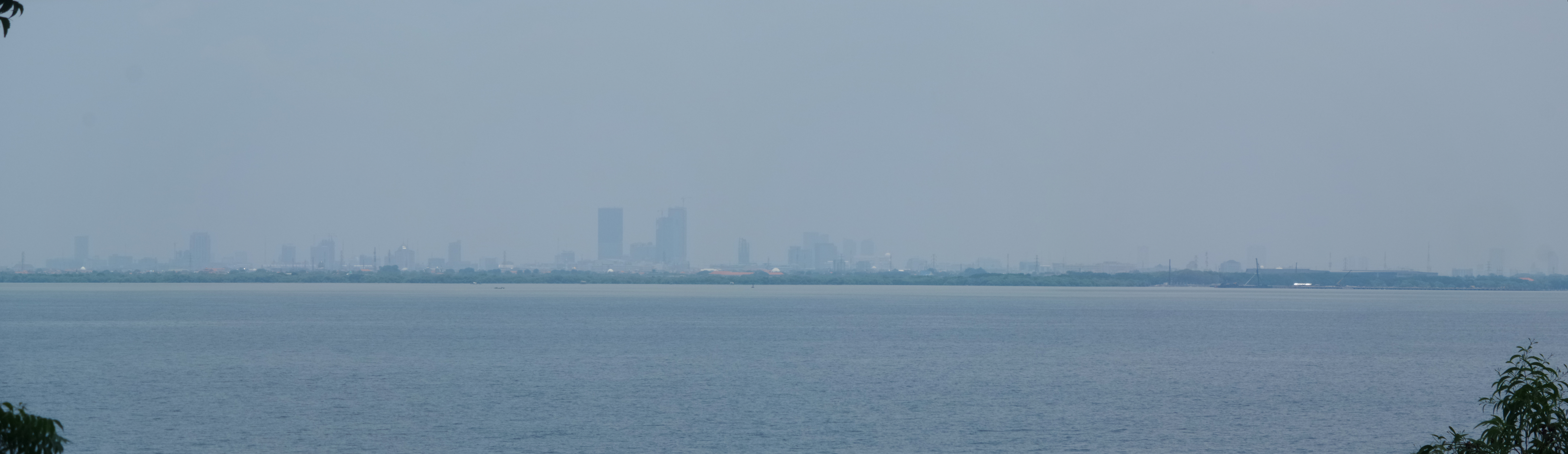 Surabaya as seen far away from a village in Madura. Unfortunately I forget bringing proper camera. Kota Surabaya dilihat dari Pulau Madura. Bukan hasil terbaik.